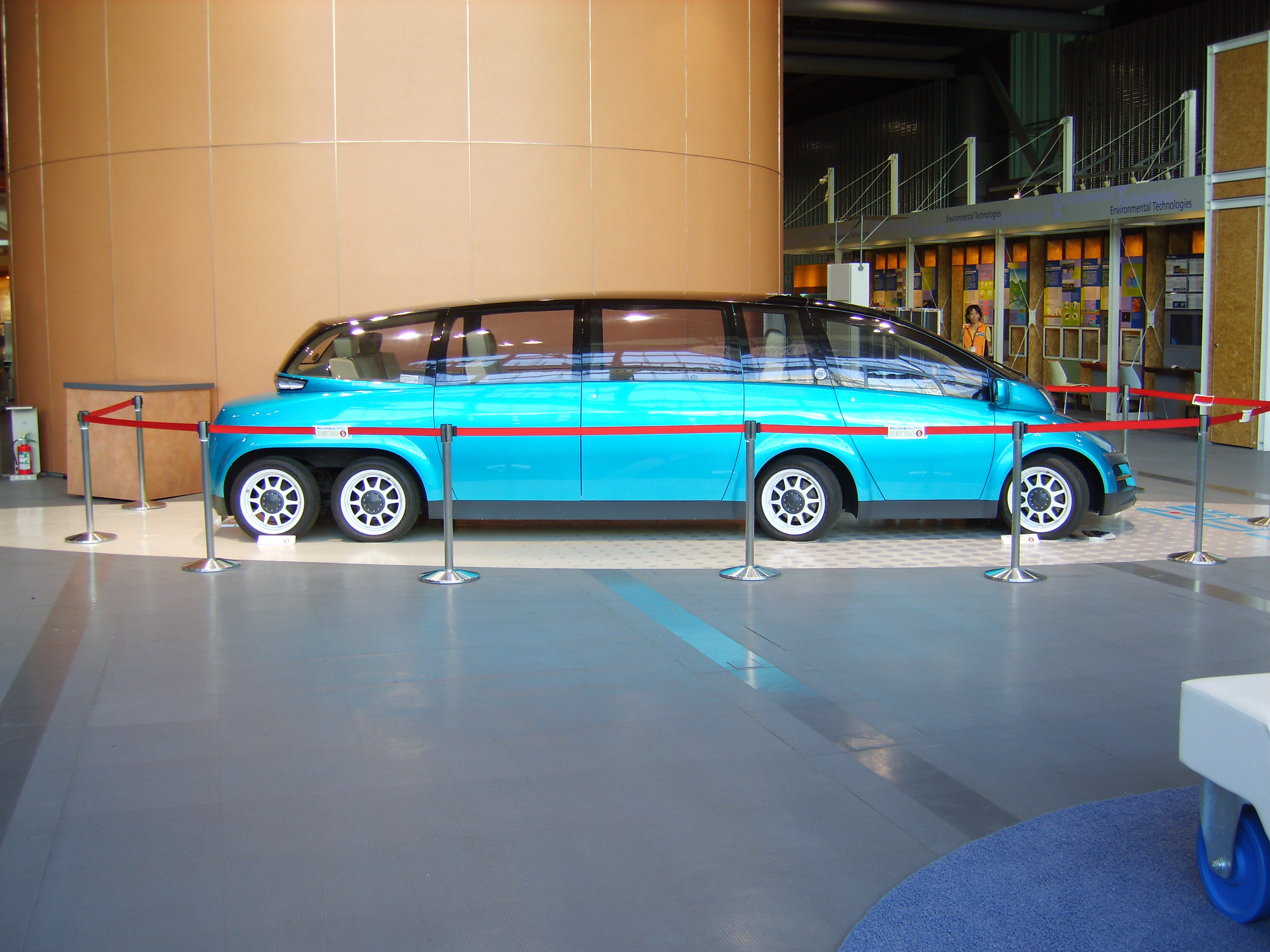 Achtsitzige Autostudie mit Elektroantrieb im Miraikan (Japanisches Nationalmuseum für Zukunftsforschung und Technologie)